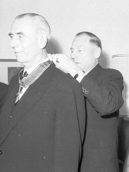 Ministerpräsident Helmut Lemke (2.v.r.) ehrt den Staatssekretär Julius Claussen (3.v.r.) mit dem Verdienstkreuz.